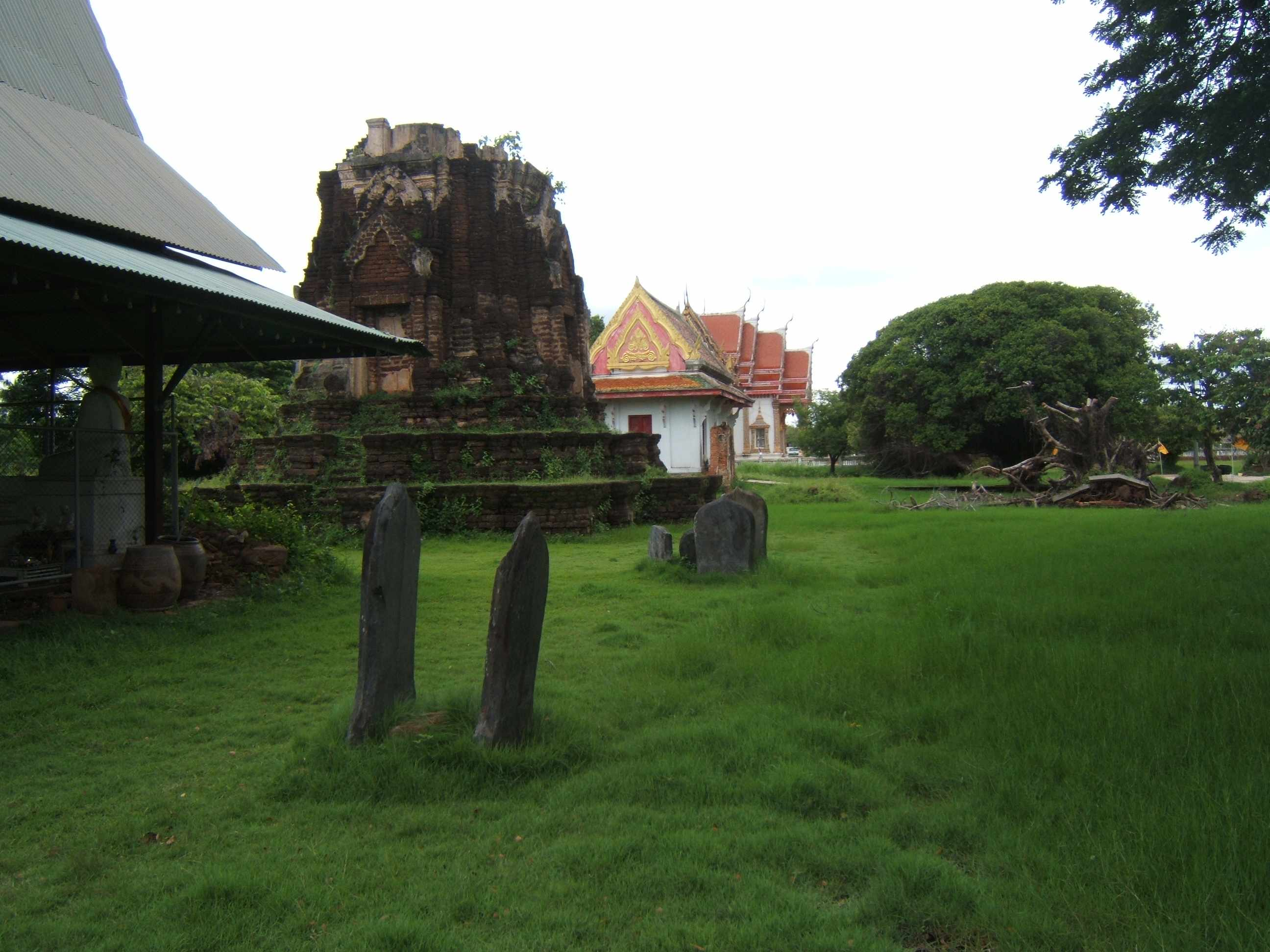 Wat Chulamani und das Grab König Boroma Radschas I.